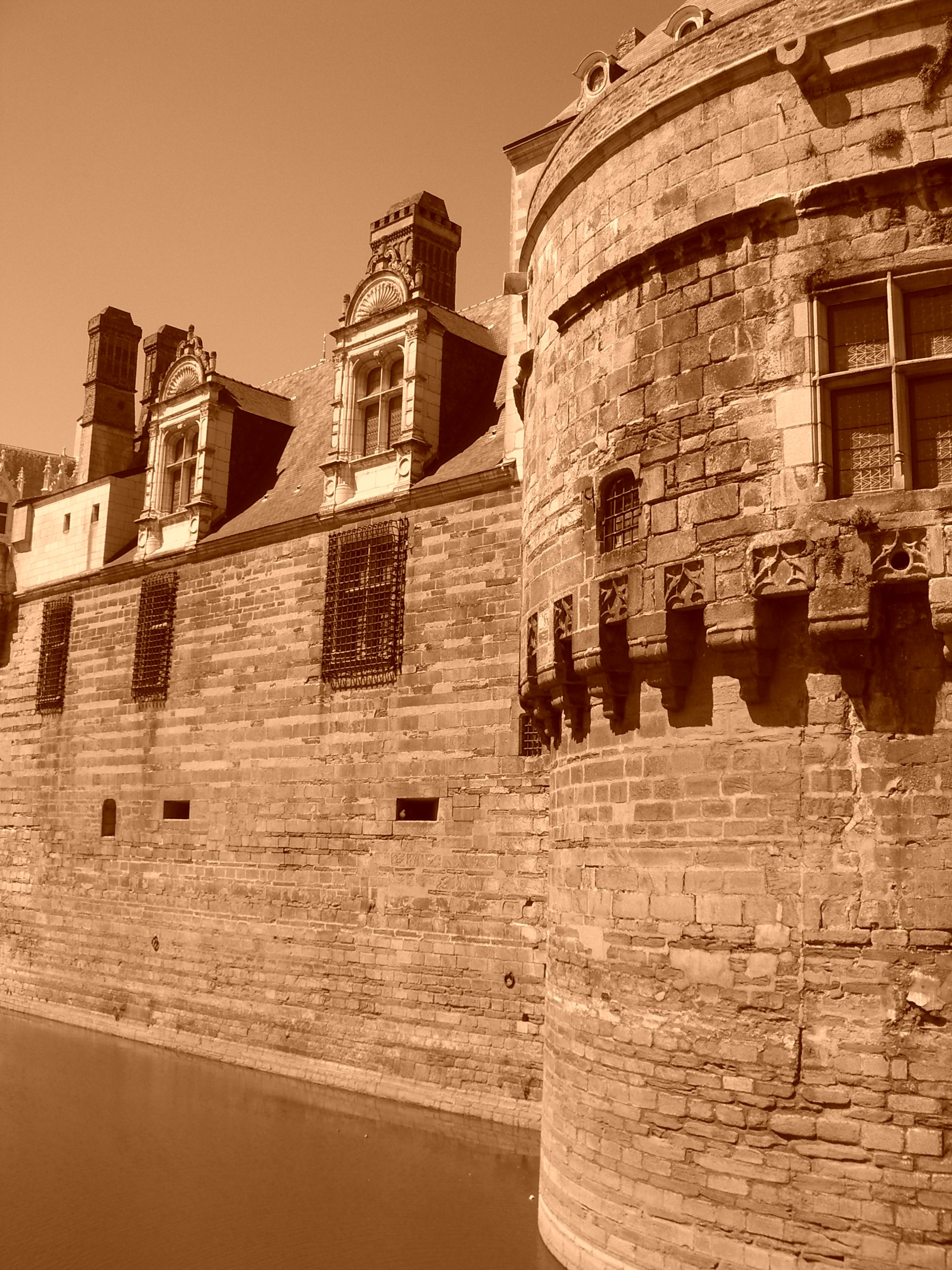 Château d'Anne de Bretagne en rénovation. Photo couleur sépia.